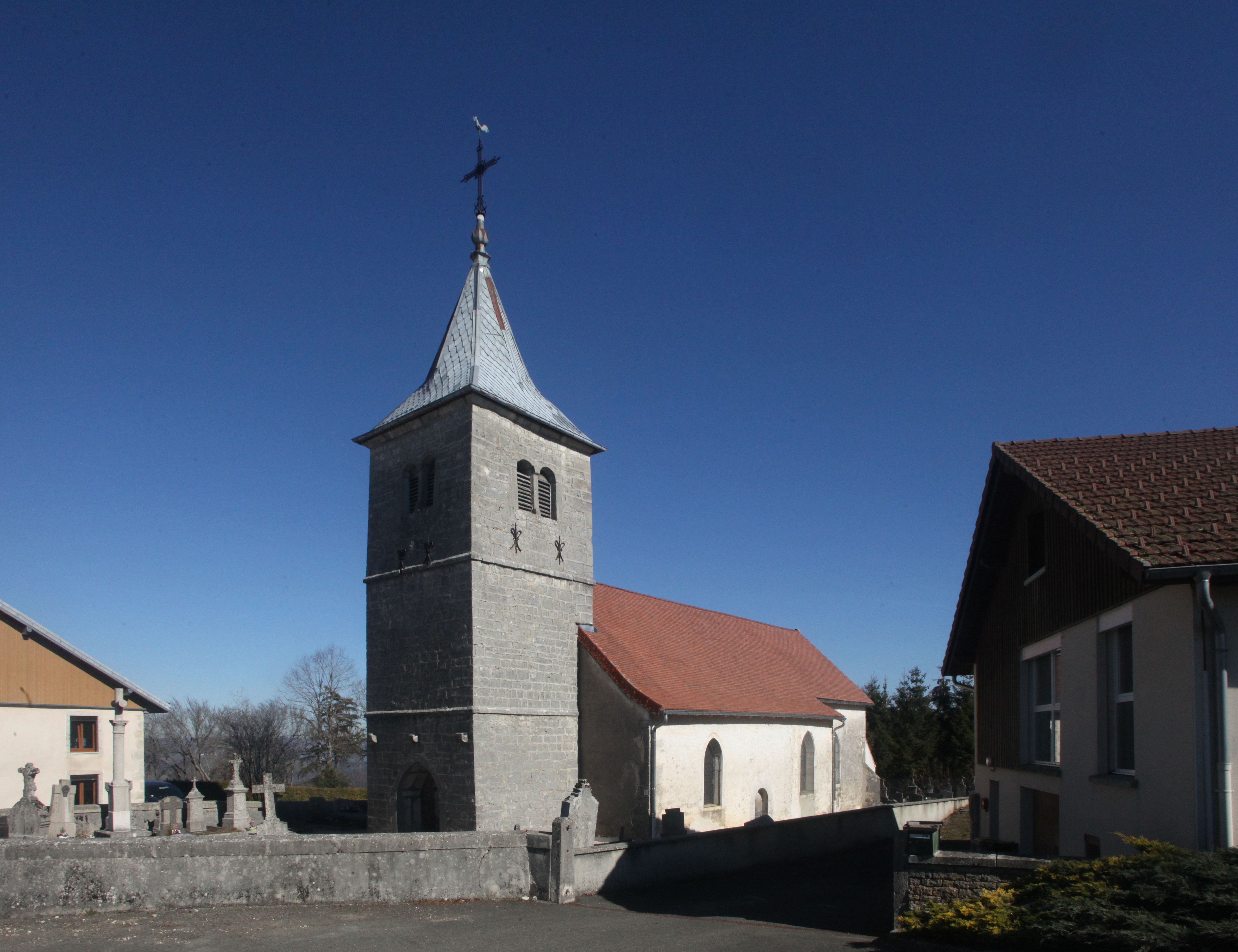 Eglise de Mont-de-Vougney.